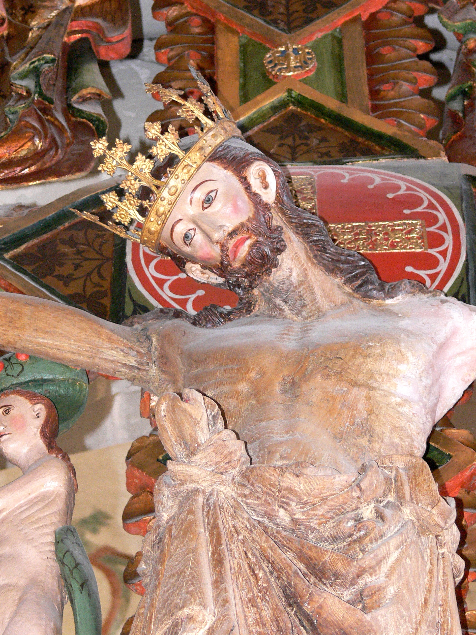 Öja kyrka auf Gotland. Triumphkreuz ( spätes 13.Jhdt. ) Kopf Christi